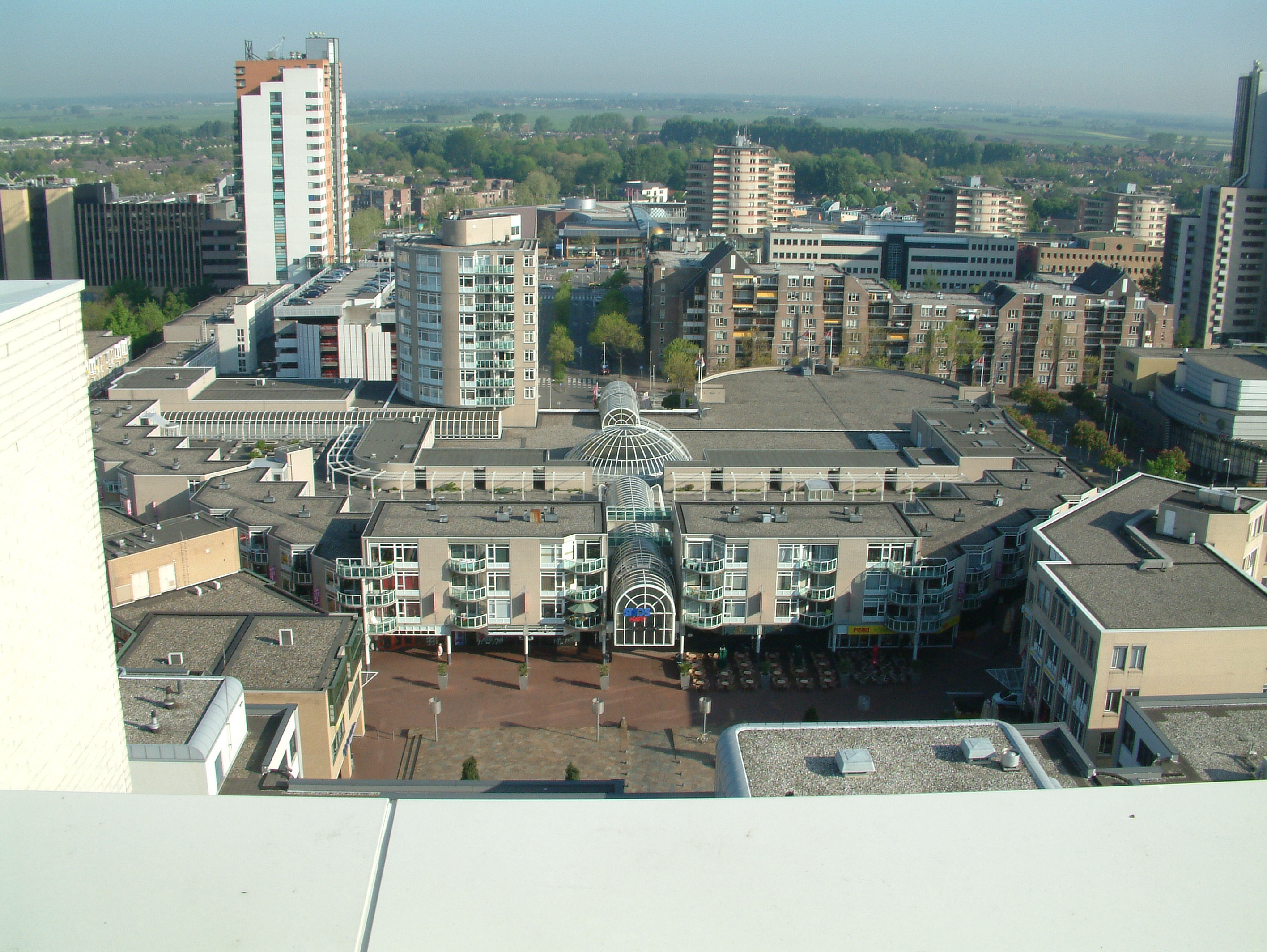 Zoetermeer Stadshart Stadhuisplein met ingang Stadshart Passage